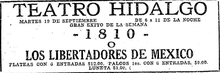 Anuncio de la exhibición de la cinta en el Teatro Hidalgo de la Ciudad de México